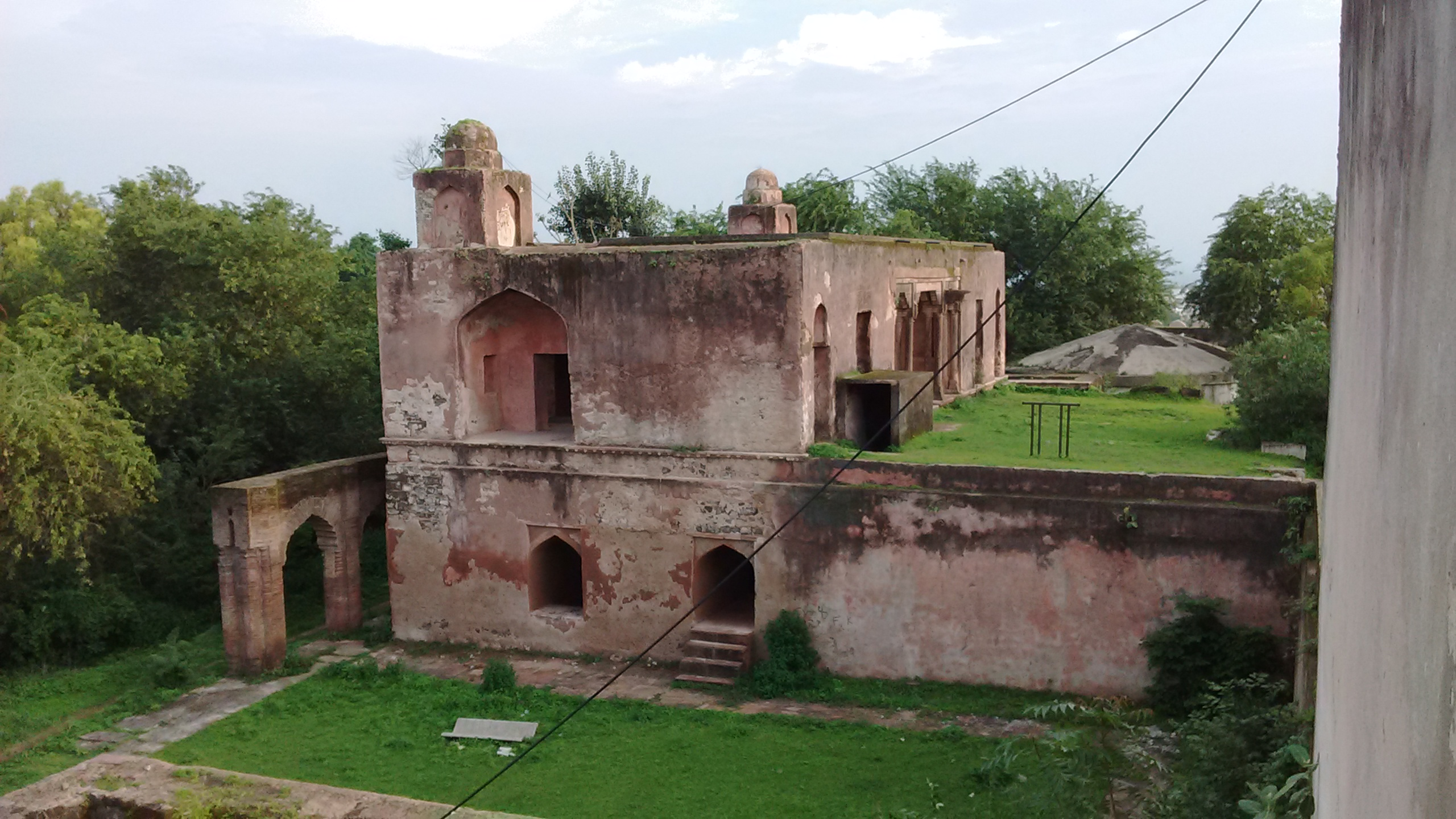 Dhar Fort, Dhar, Madhya Pradesh